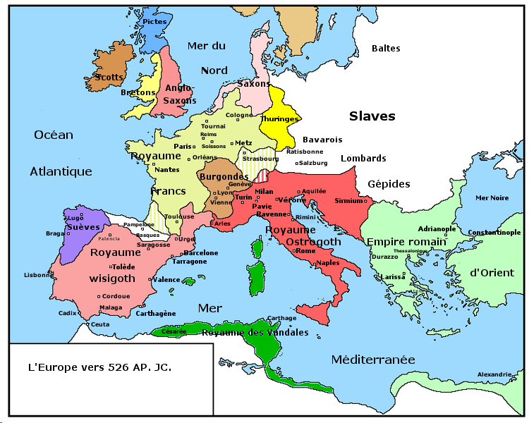 Royaumes germaniques en vers 530.